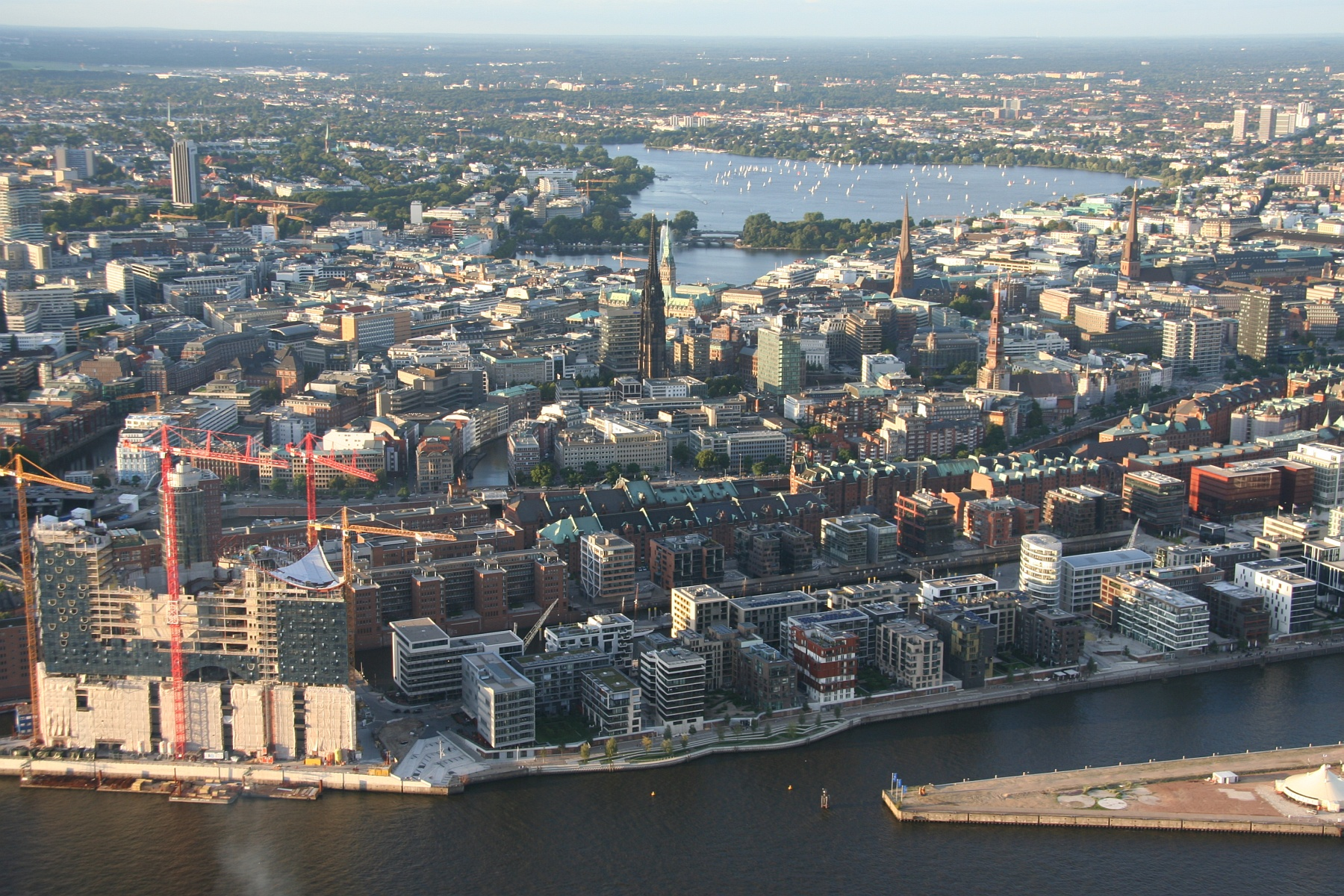 Blick über die HafenCity und die Speicherstadt auf Binnen- und Außenalster